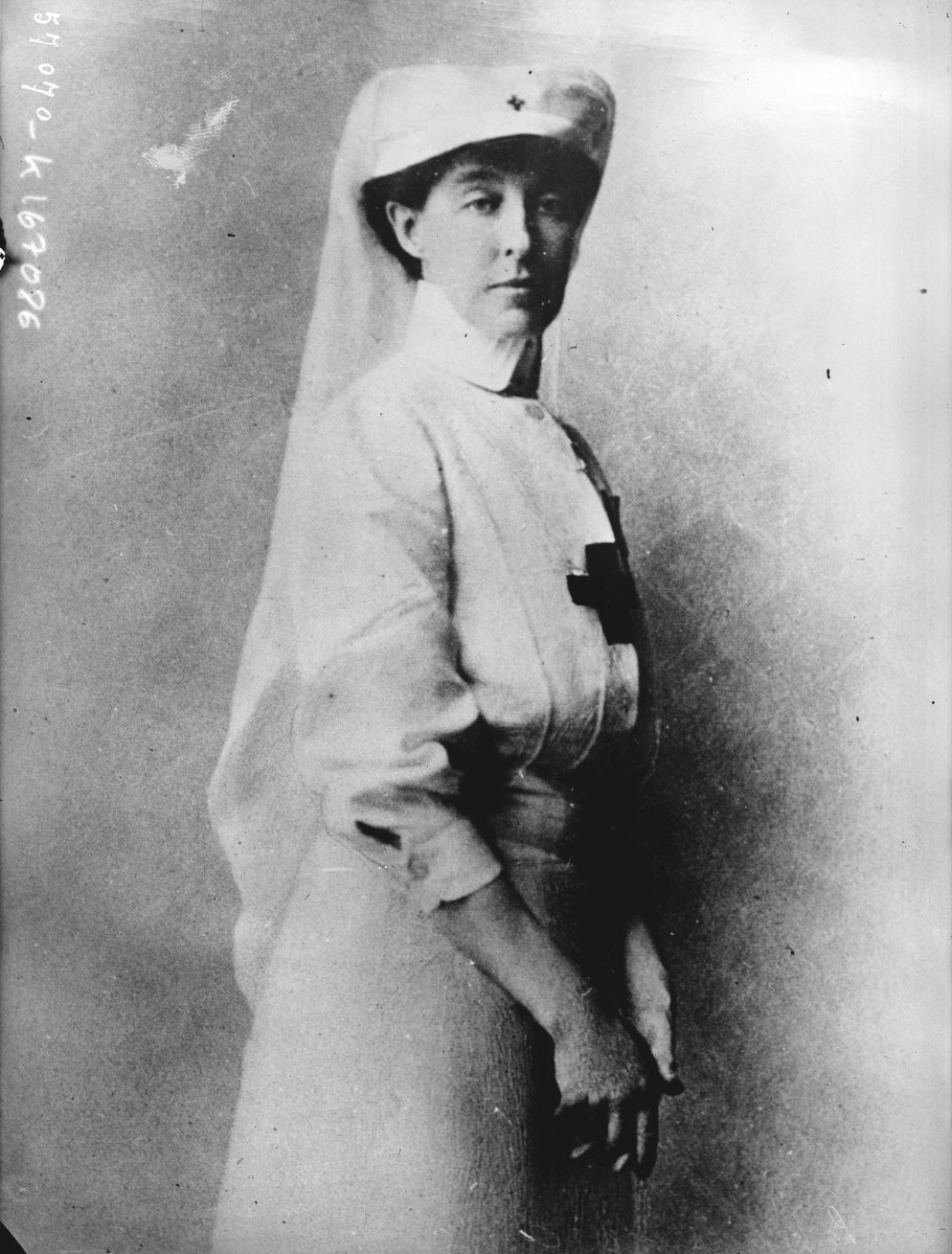 Hélène d’Orléans, princesse de Savoie et duchesse d’Aoste (1871-1951).